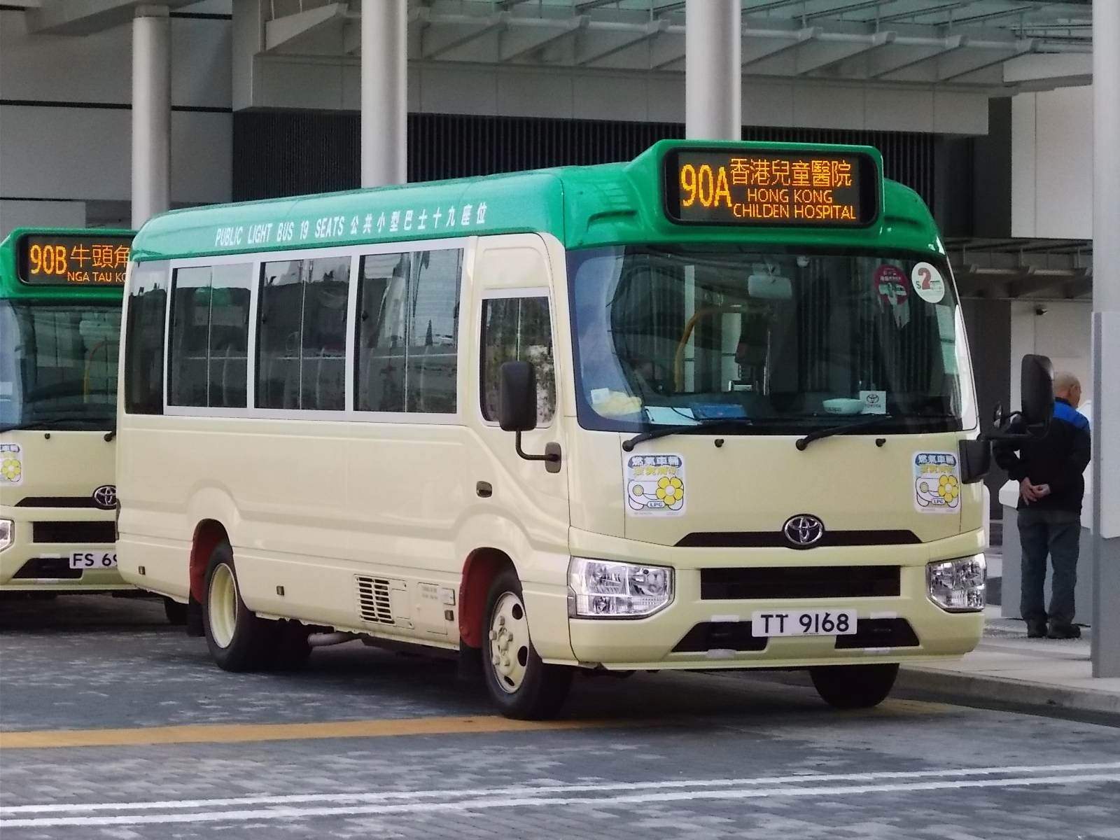 九龍專線小巴90A線，在兒童醫院等候開出